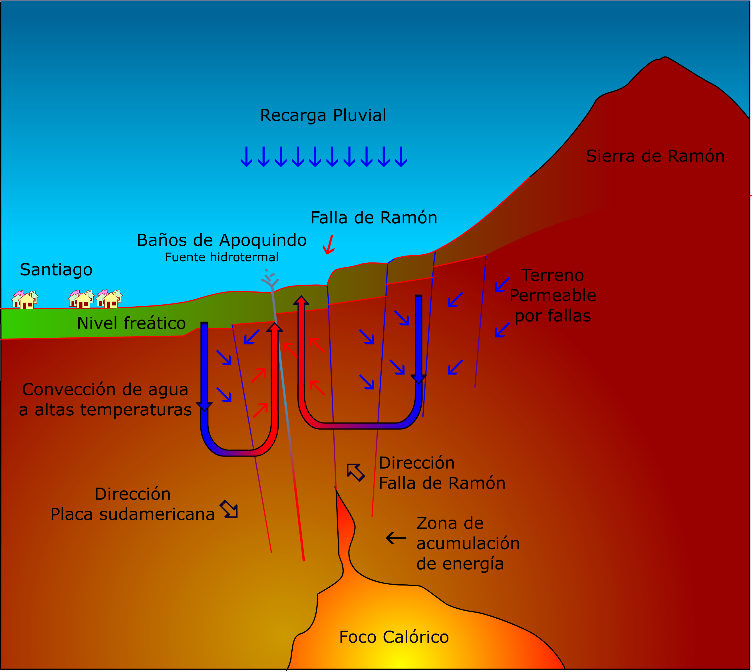 diagrama de la Falla de Ramón con indicación de fuentes hidrotermales y zona de falla